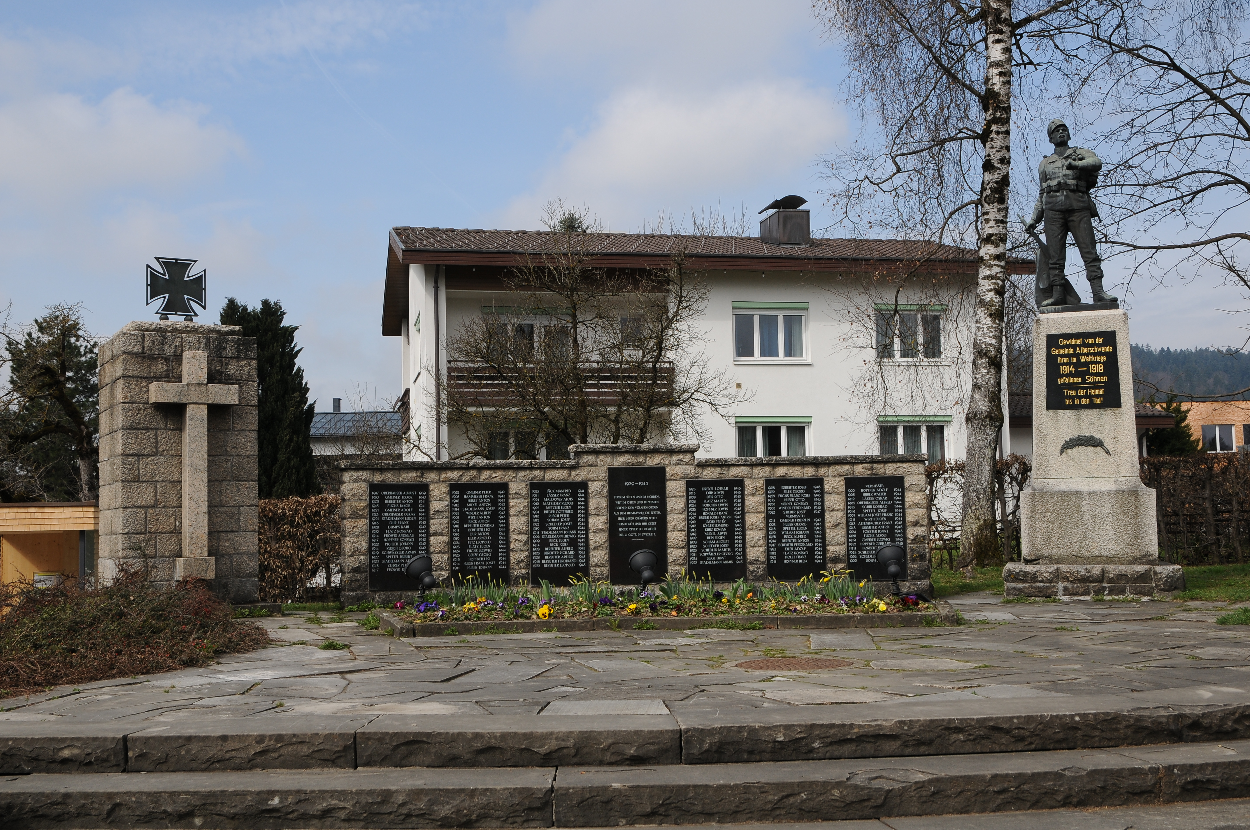 Alberschwende, Kriegerdenkmal 1914 -1918 und 1939 -1945. Das Denkmal steht unter Denkmalschutz.